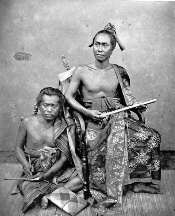 Foto. Studioportret van Gusti Jilantik, vorst van Buleleng, met secretaris.